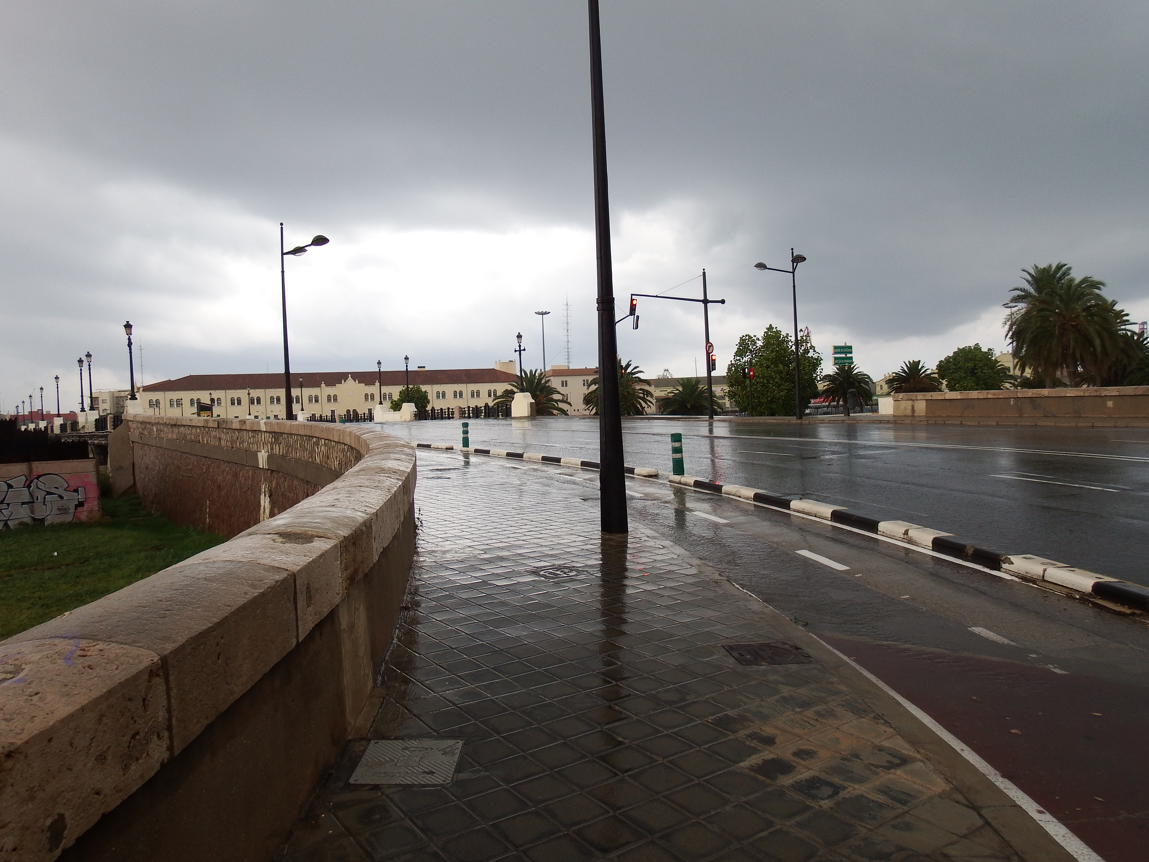 Vistas generales del Puente de Astilleros en Nazaret, Valencia